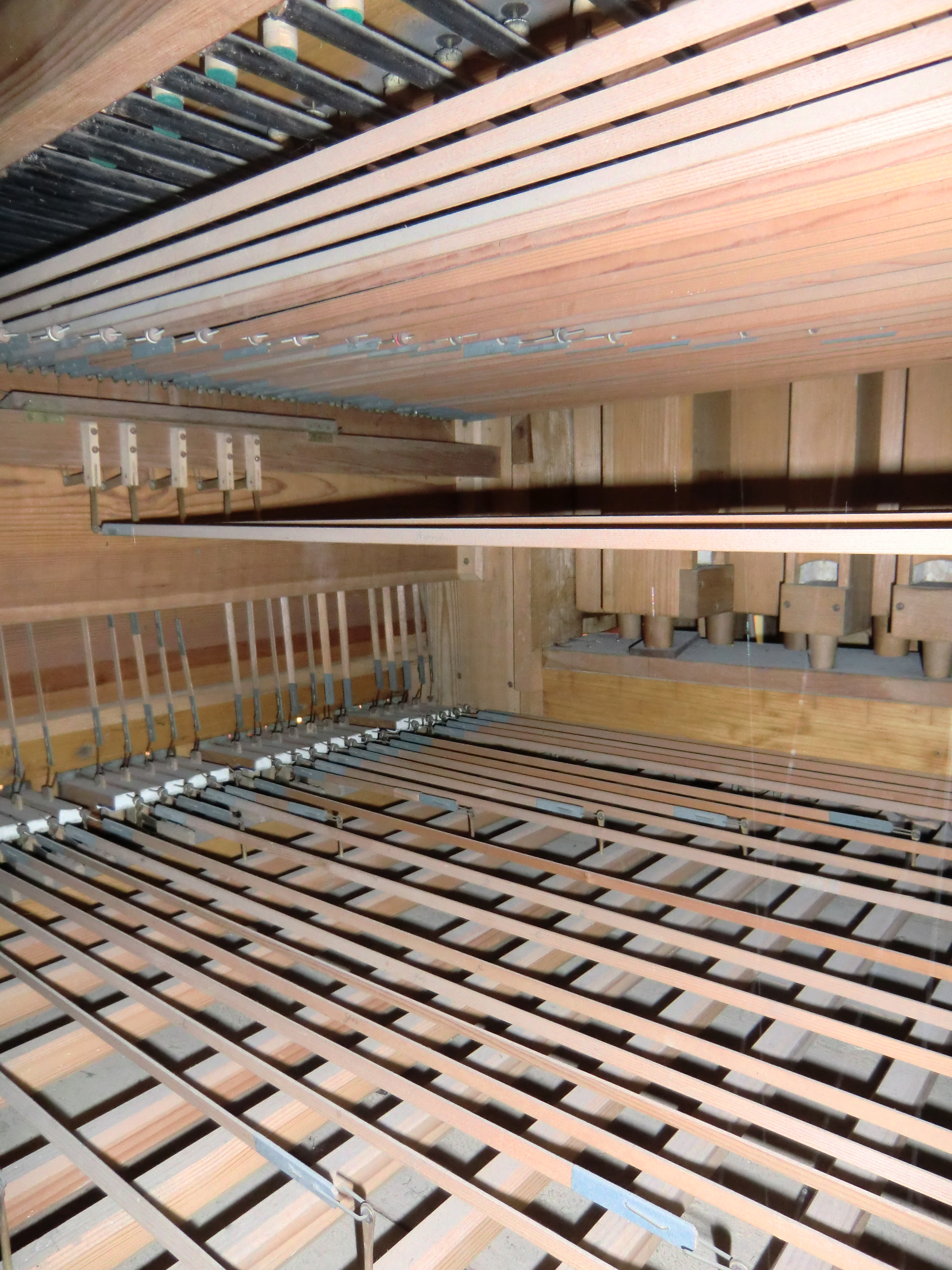 Horn-Orgel in Sauerthal (1903) - Trakturführung Pedal (unten), Register (Mitte), Manual (oben) - mechanische Kegellade